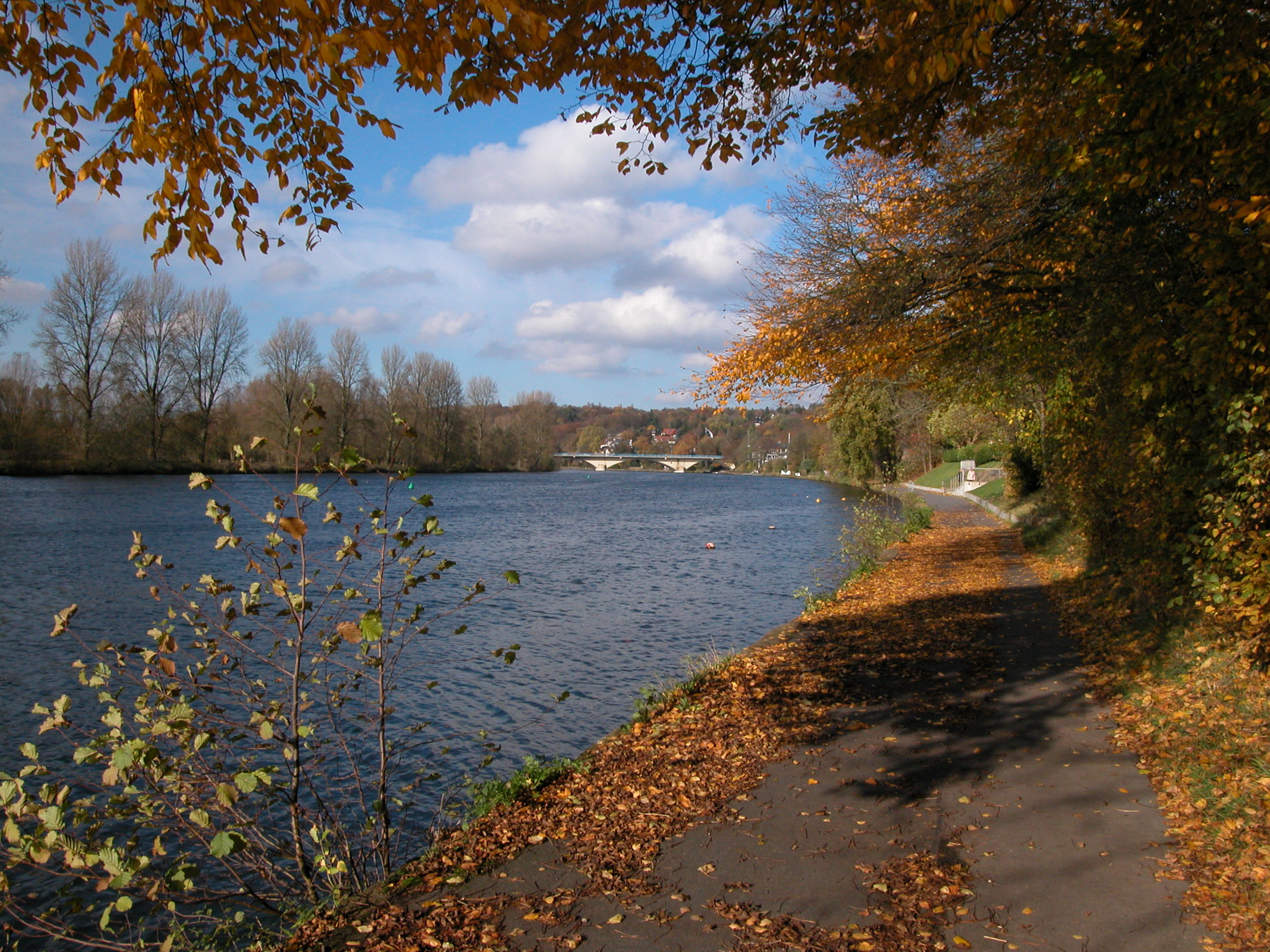 Mendener Brücke (B1) in Mülheim an der Ruhr.